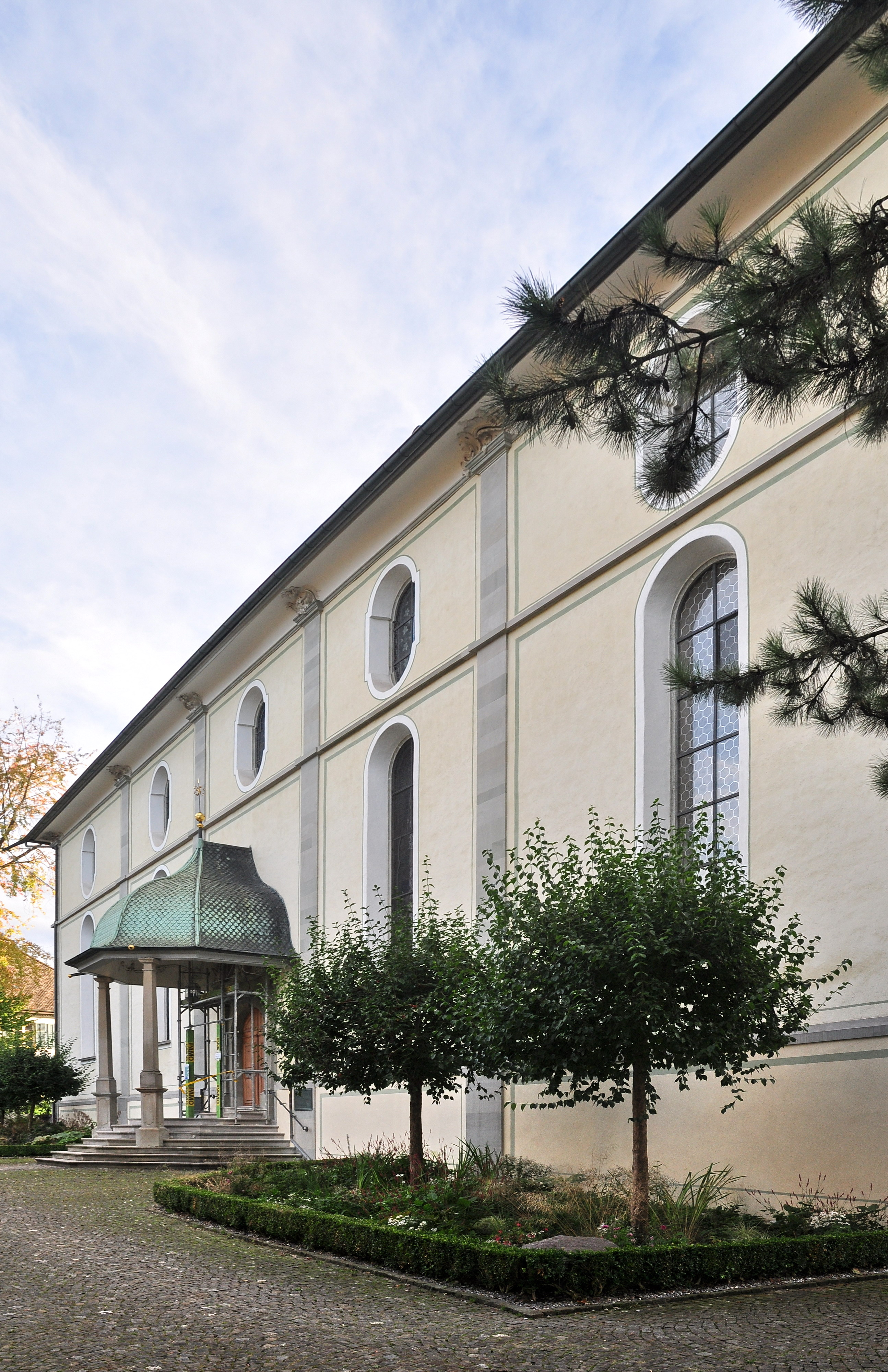 Reformierte Kirche, Schönenbergstrasse 9 in Wädenswil (Switzerland)